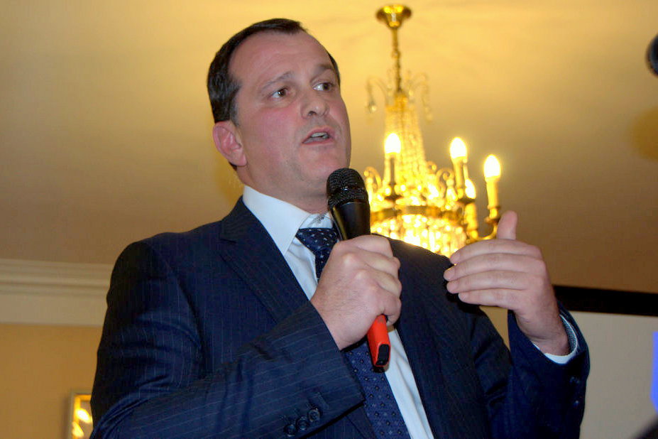 Louis Aliot, fondateur du Club Idées Nation.